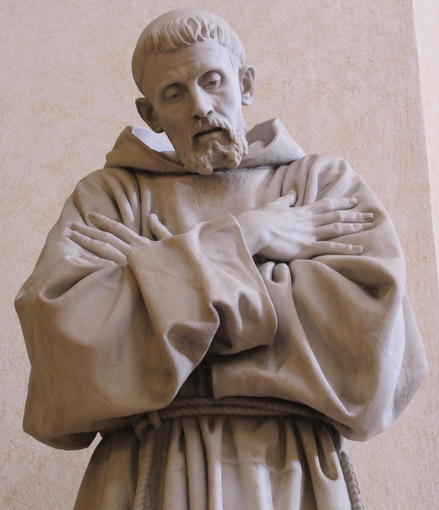 Asisi, san rufino, interno, s. francesco di giovanni duprè